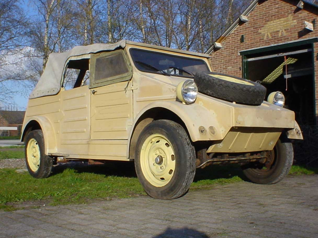 Replika VW Typ 82 (PET Products)